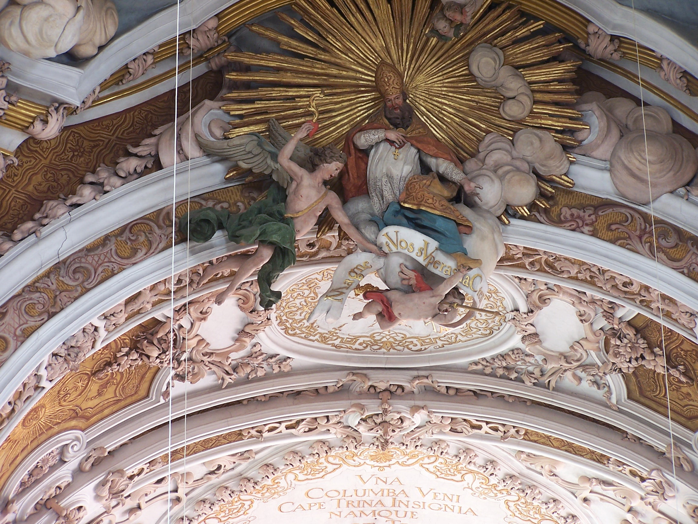 Rohr in Niederbayern. Abt-Dominik-Prokop-Platz 3. Katholische Pfarr- und Klosterkirche Mariä Himmelfahrt. Ehem. Augustinerchorherren-Stiftskirche, barocke Anlage mit Seitenkapellen und Querarmen, 1717–22 von Egid Quirin Asam erbaut. Stuckaturen im Gewölbescheitel.